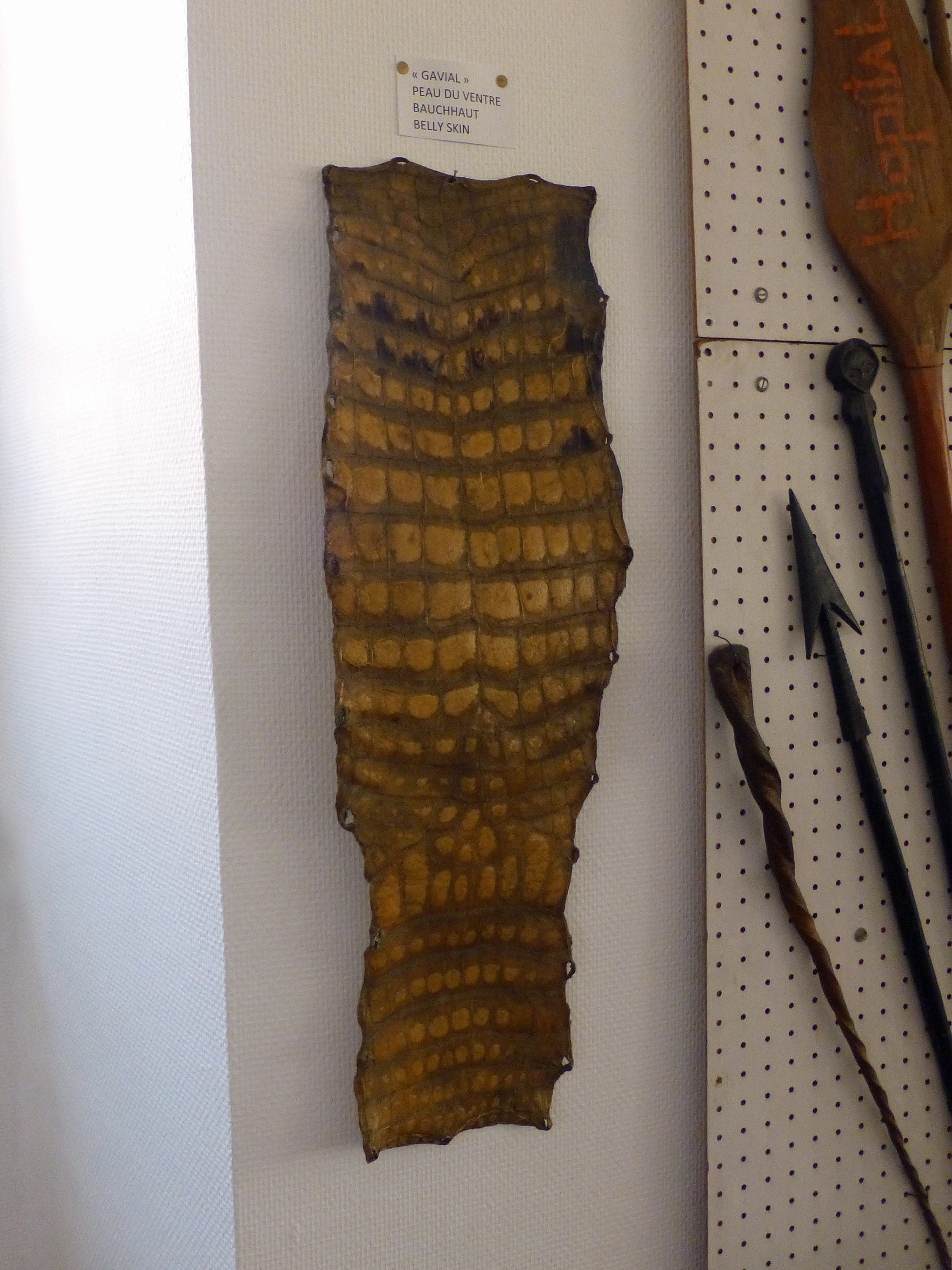 Musée africain de Gunsbach (Haut-Rhin) : peau du ventre de gavial du Gabon